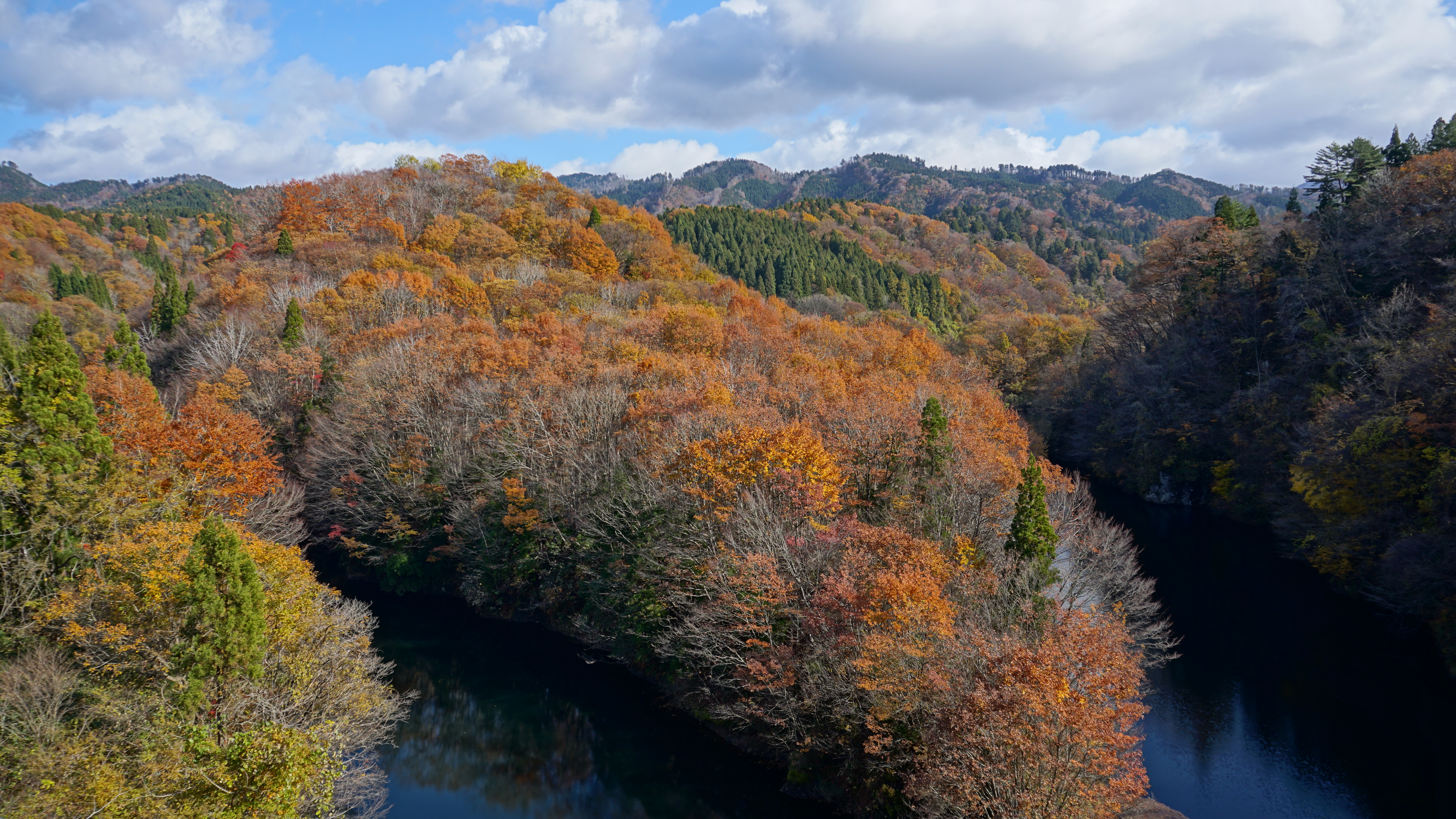 旭川治水ダムのダム湖、仁別湖（秋田県秋田市）。このダムは利水を目的とせず洪水調節を目的としているために、堤体高に比して平時の水位が低い。左手が砥沢、右手が旭川本流で、両者がダムを前に合流する。